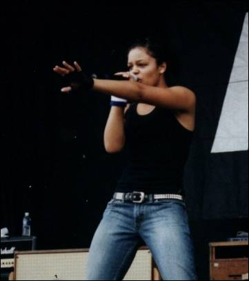 selbst aufgenommen